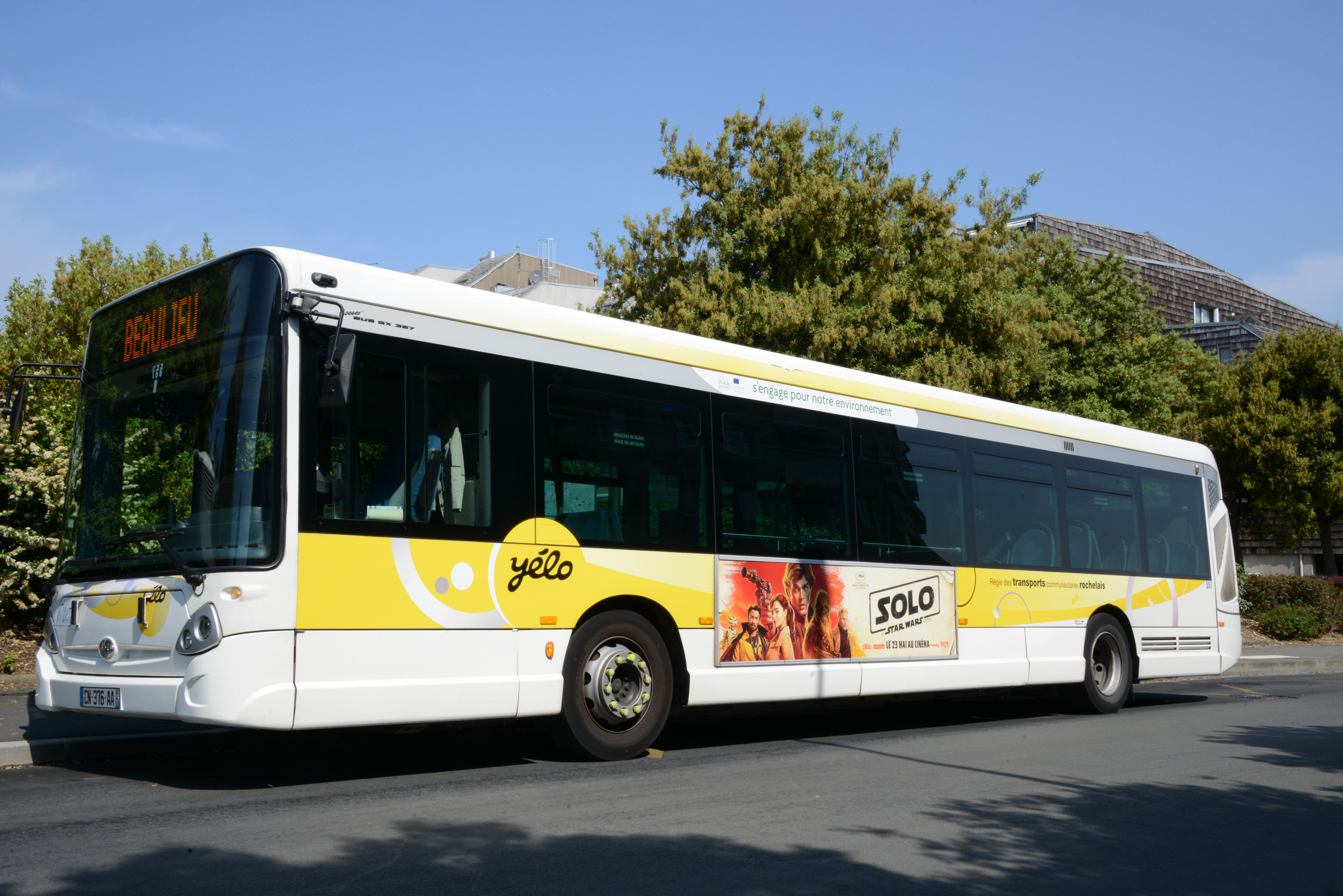 Un bus de la Régie des transports communautaires Rochelais (RTCR) arrêté au terminus des bus des Minimes. Ligne 4 Les Minimes – Beaulieu. 2018. La Rochelle, Charente-Maritime, France.